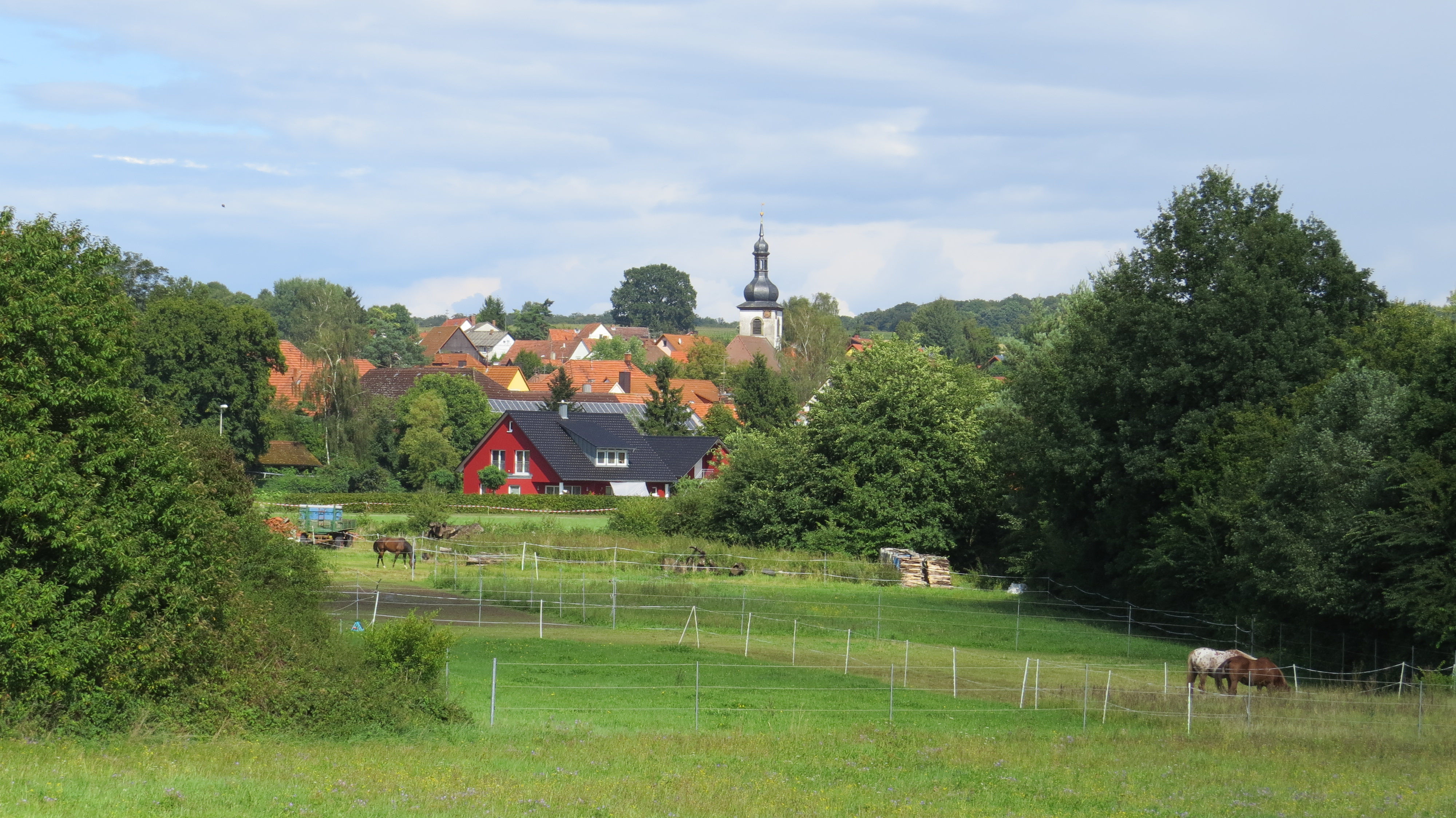 Ermershausen